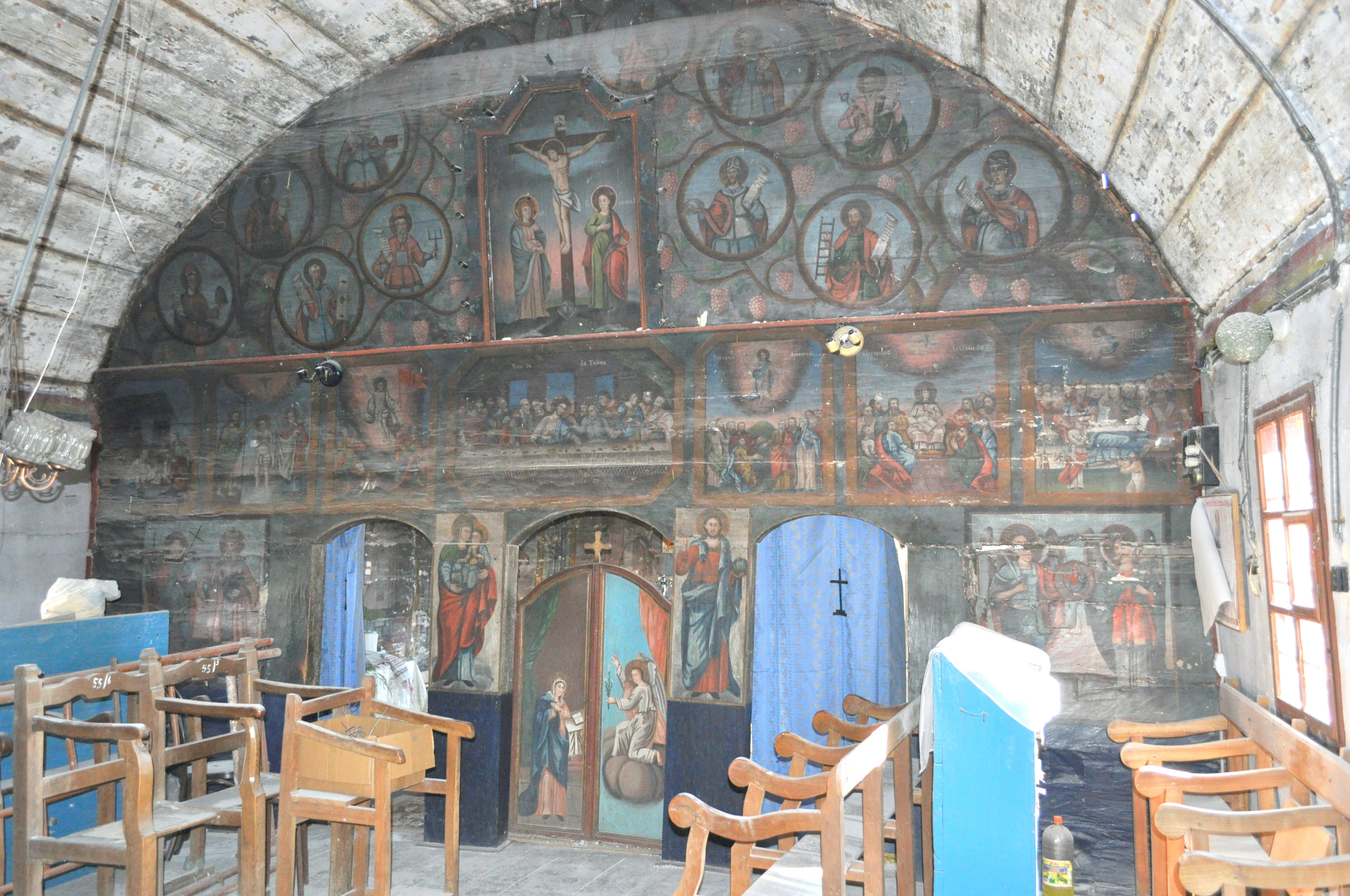 Biserica de lemn „Sfântul Mare Mucenic Gheorghe” din Ionești, județul Arad